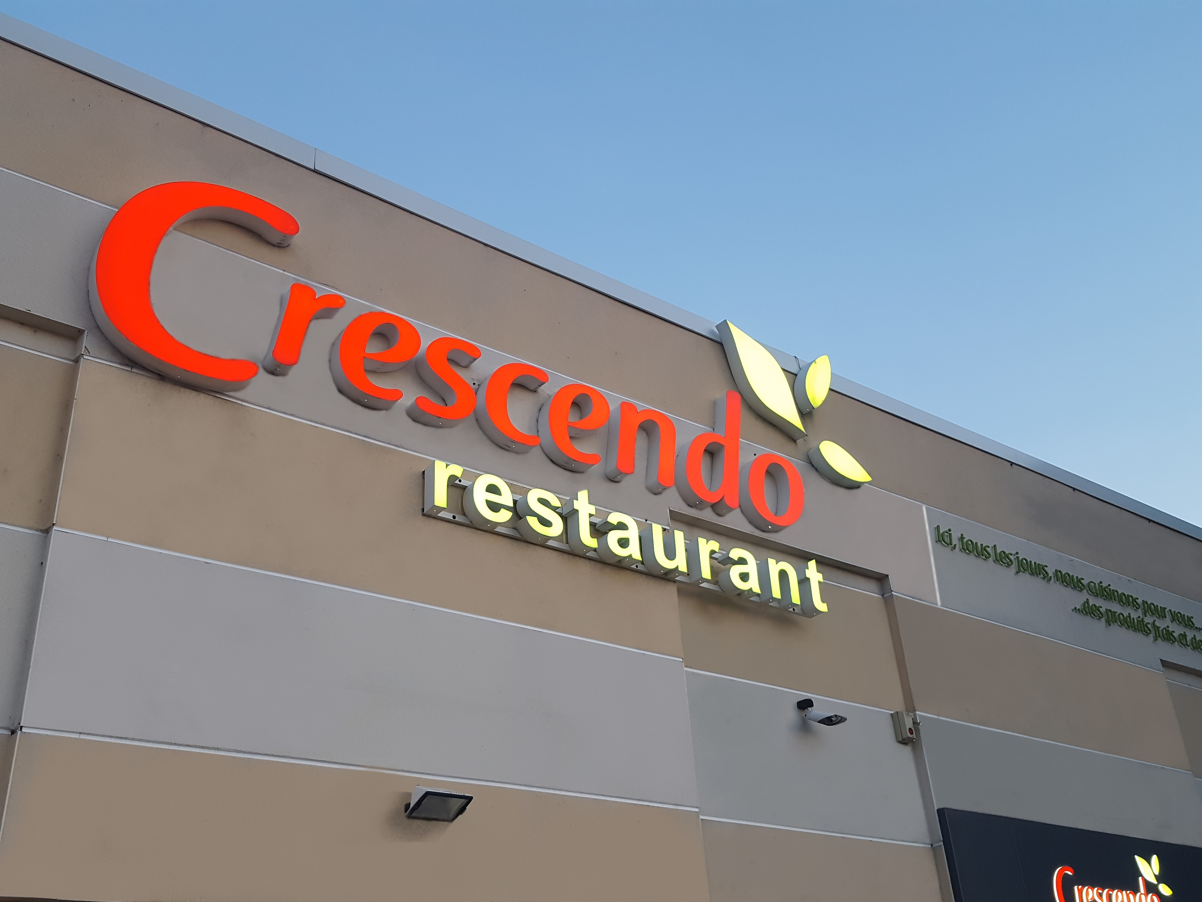 Cafétéria de Thiers 63